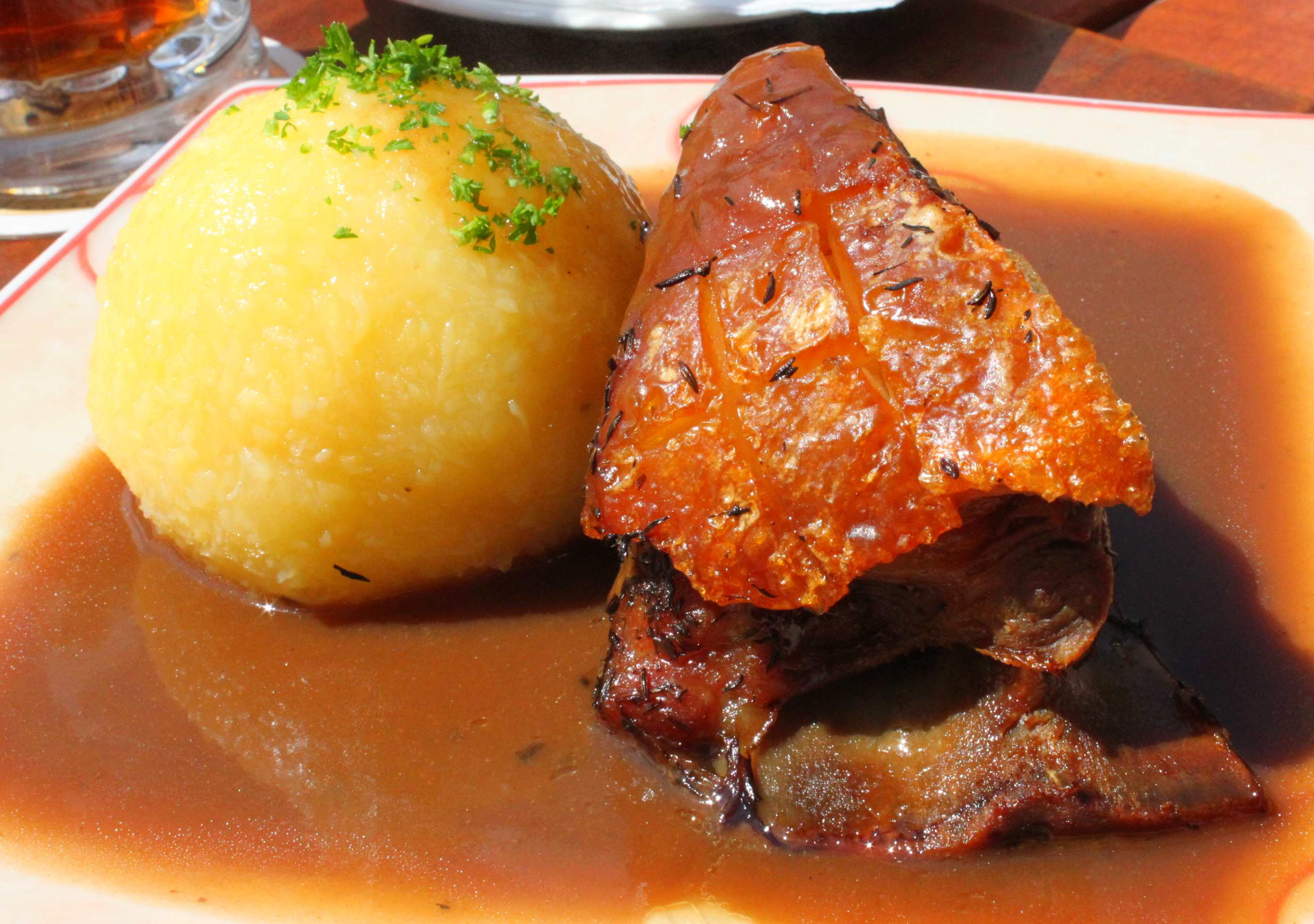 Das Schäufele ist das Schulterblatt des Schweins. Das Fleisch wird komplett mit dem Schulterblatt-Knochen und der Fettschwarte im Ofen gegart. Dazu wird eine dunkle Bratensoße und Kartoffelklöße gereicht.